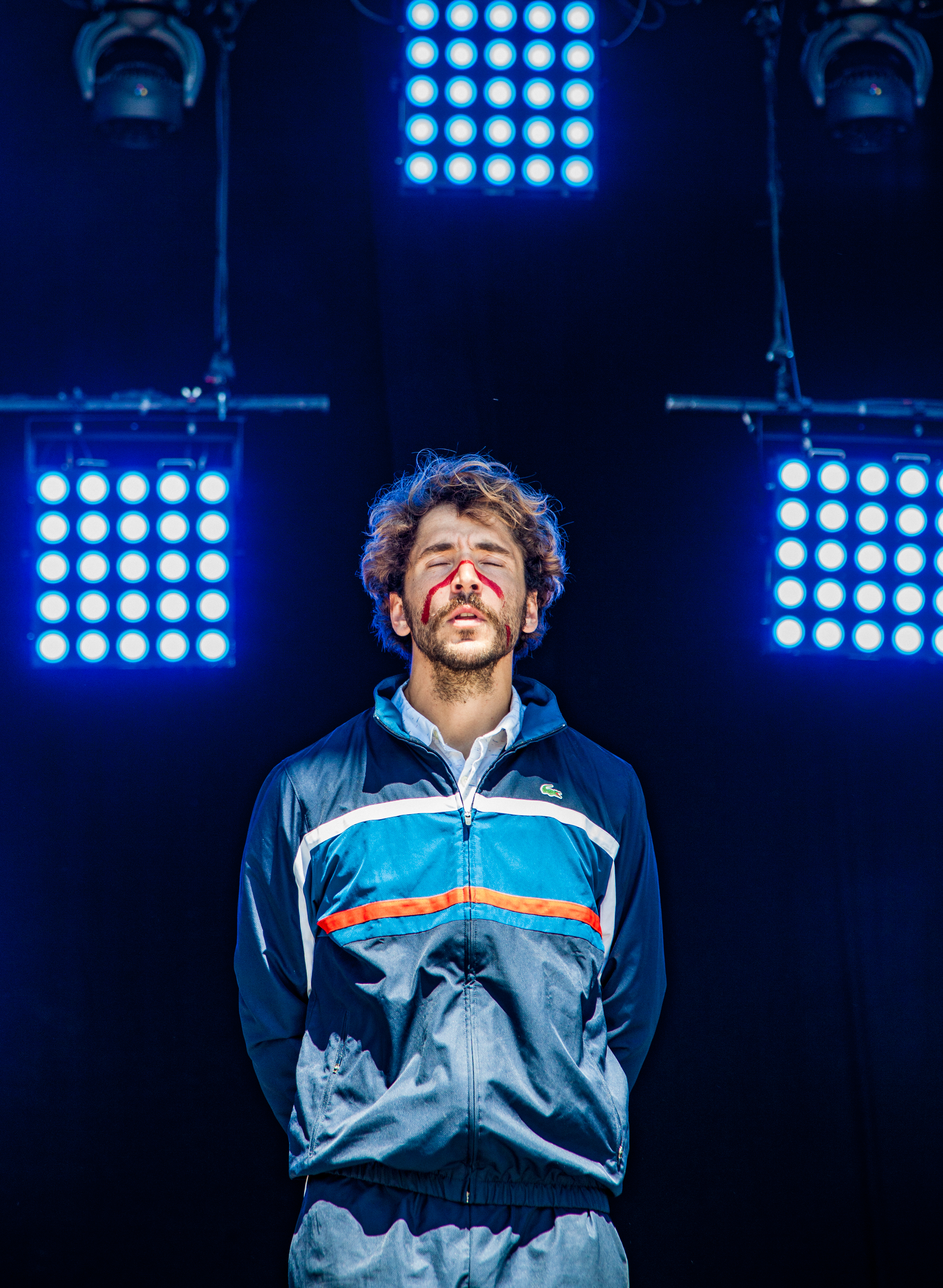 Marina Bincoletto 2017